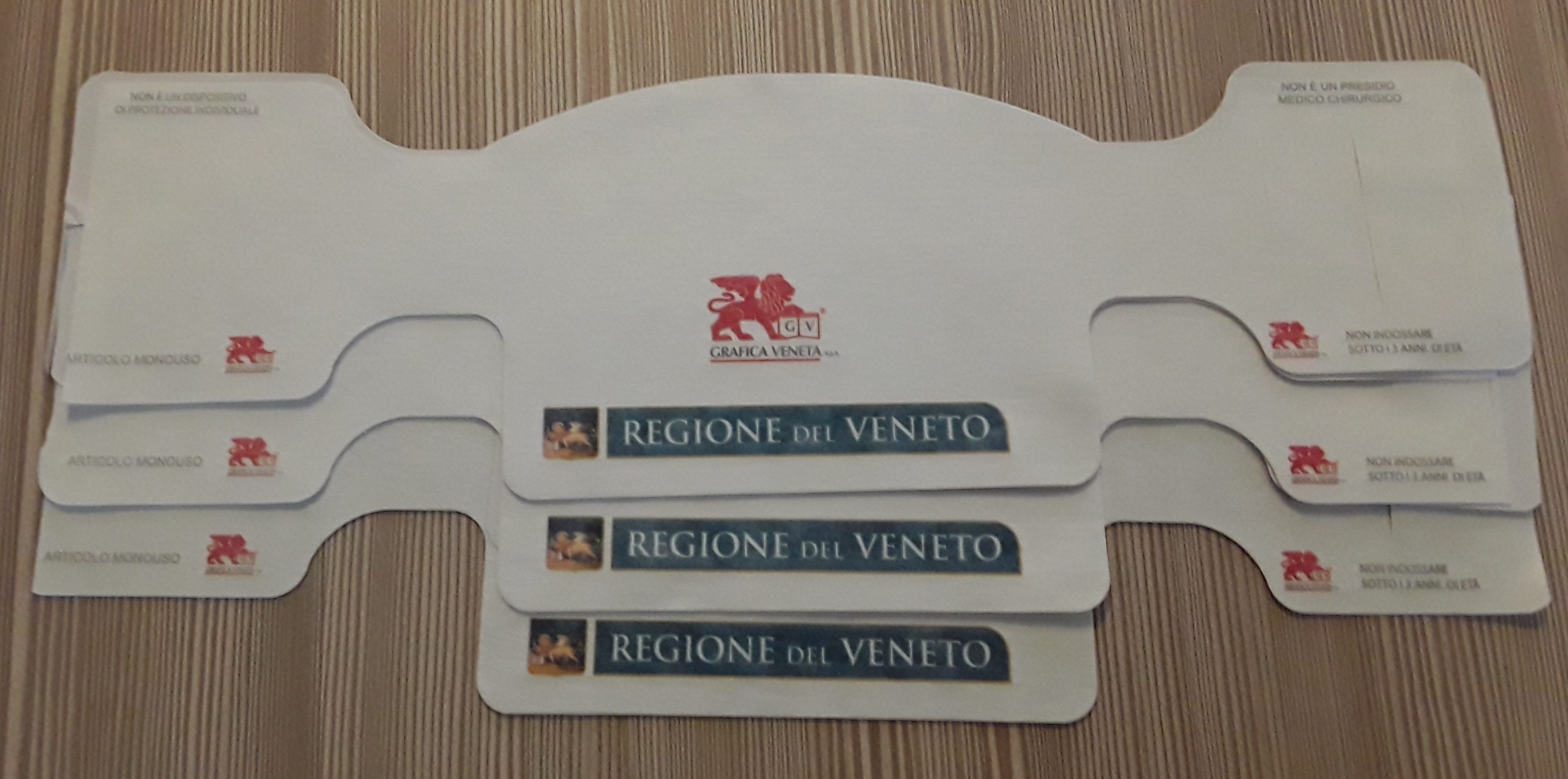 Mascherine regalate dalla Grafica Veneta alla Regione Veneto